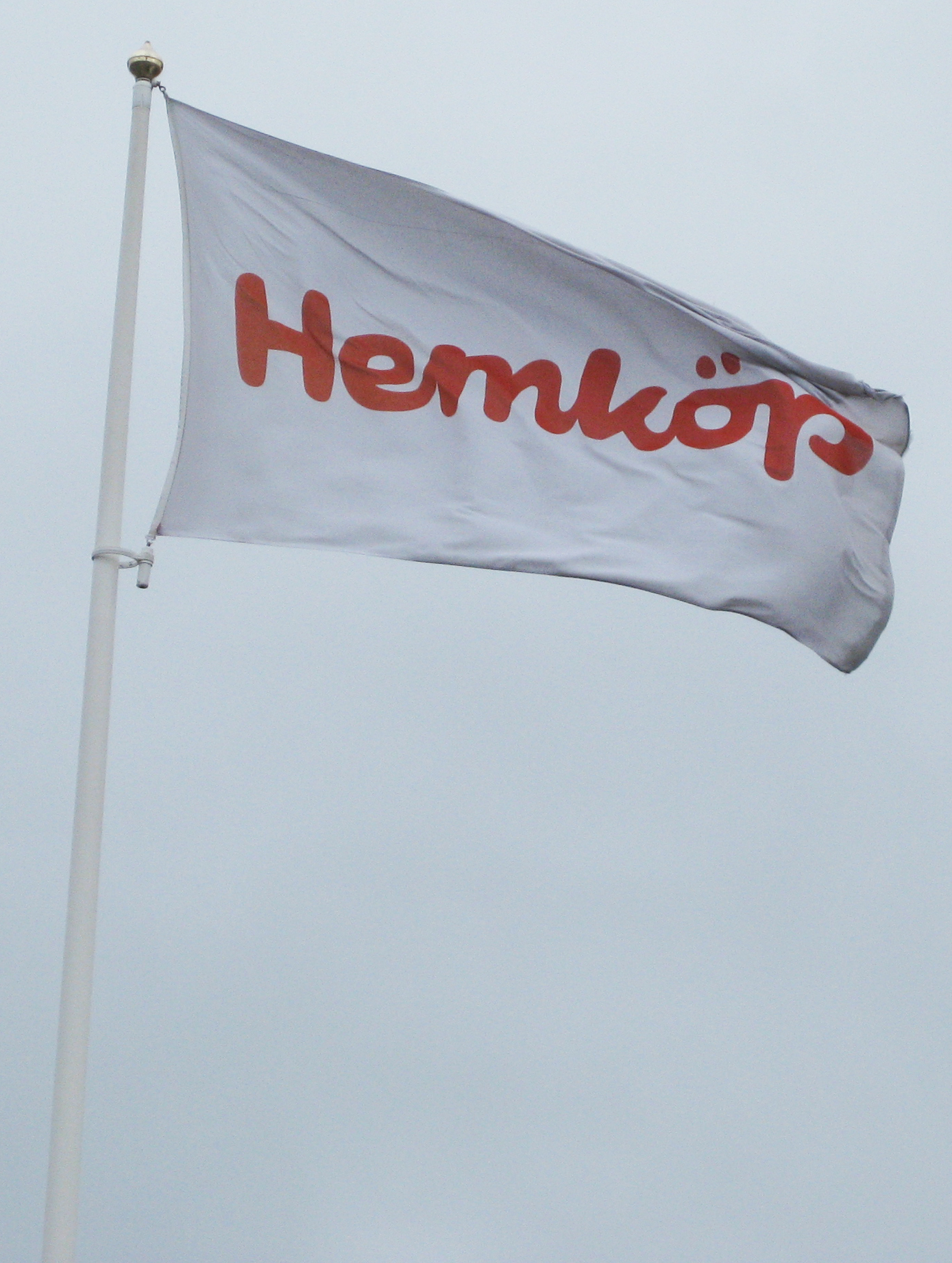 Hemköpsflagga